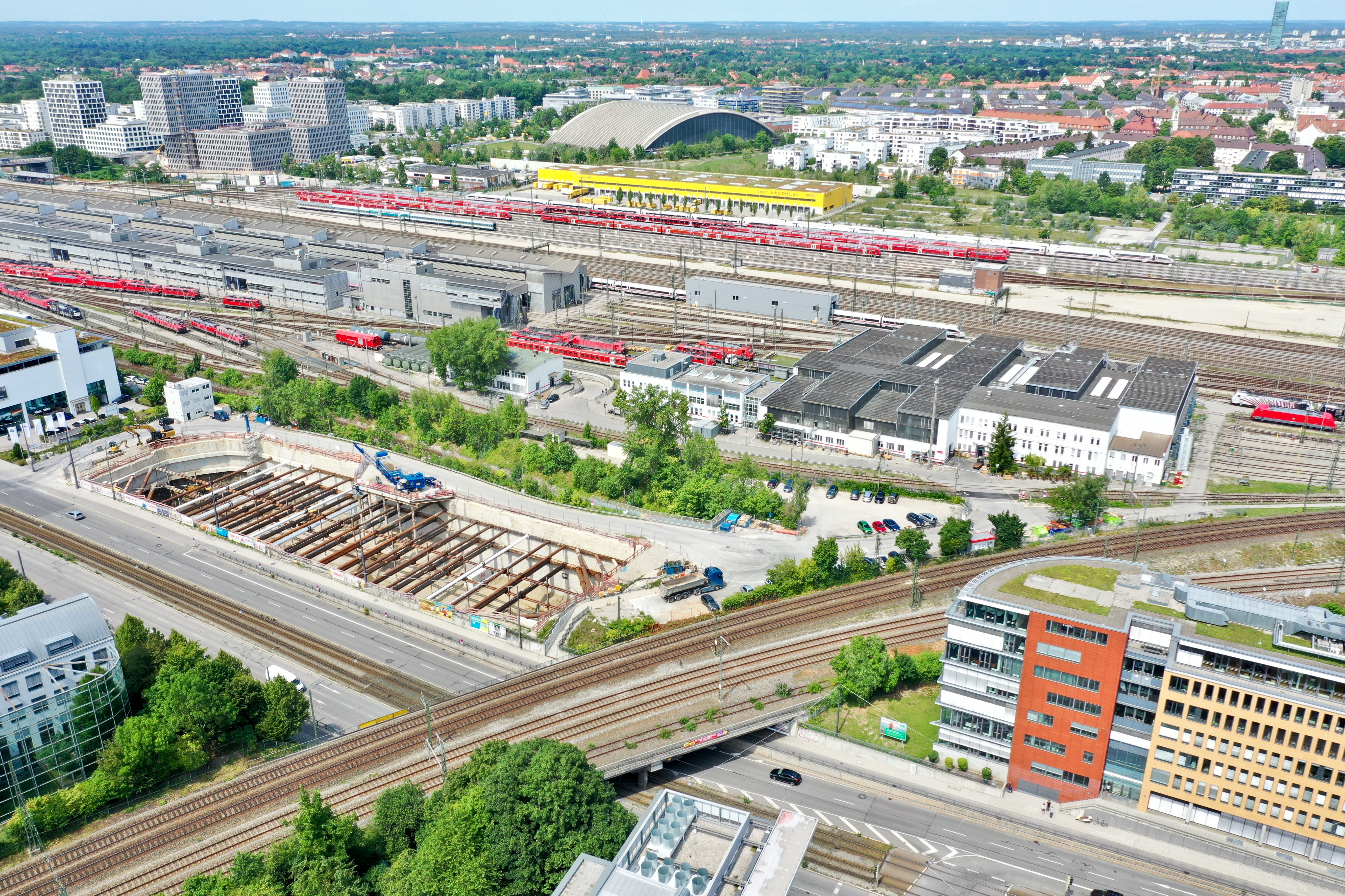 Bahnbetriebswerk München Hbf Luftaufnahme von Süden aus gesehen. Links das ICE-Betriebswerks, rechts die Lokhalle. Im Vordergrund der Abzweig zum Südring.